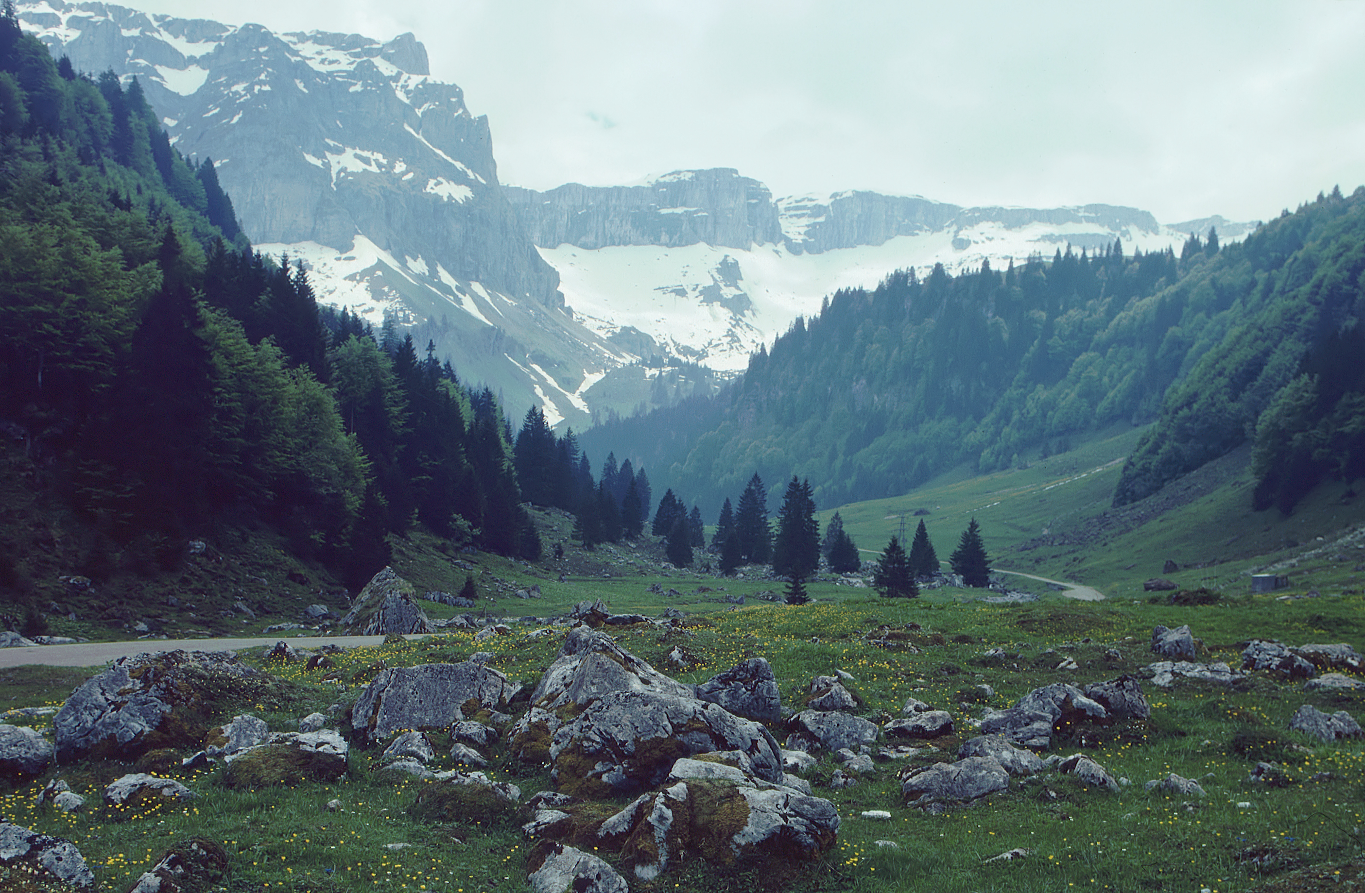 Bisistal - Talweg nicht weit entfernt von der Talstation der Luftseilbahn auf die Glattalp; Kanton Schwyz/Zentralschweiz